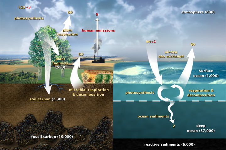 Циклус на јаглеродот во сите негови сфери